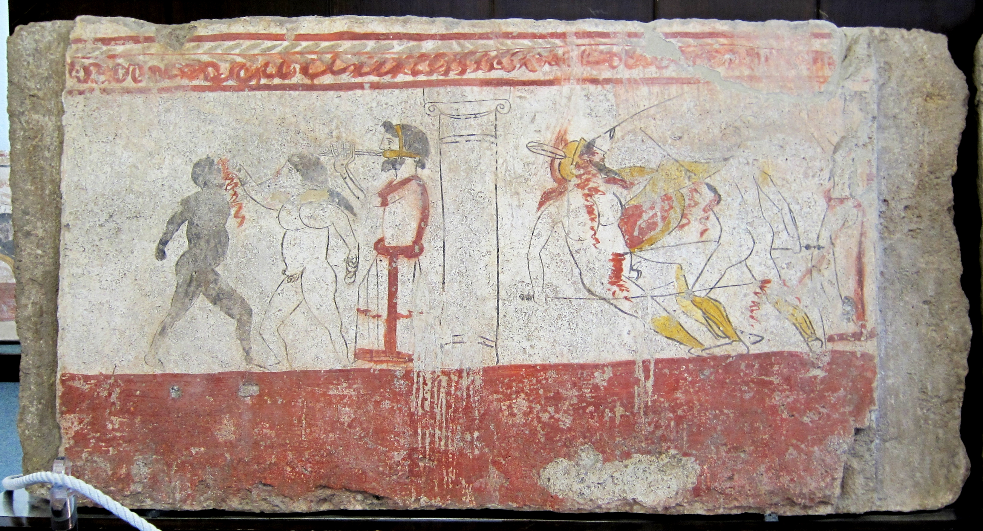 Gladiator games honoring a deceased. Fresque de tombe lucanienne au Museo archeologico nazionale de Paestum (Italie).